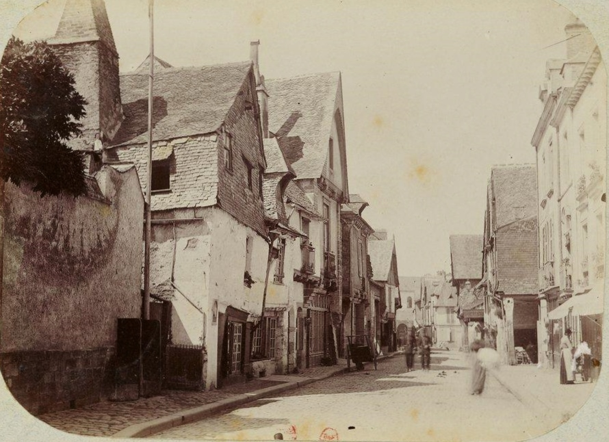 Une rue de Vitré (Ille-et-Vilaine, Bretagne, France).